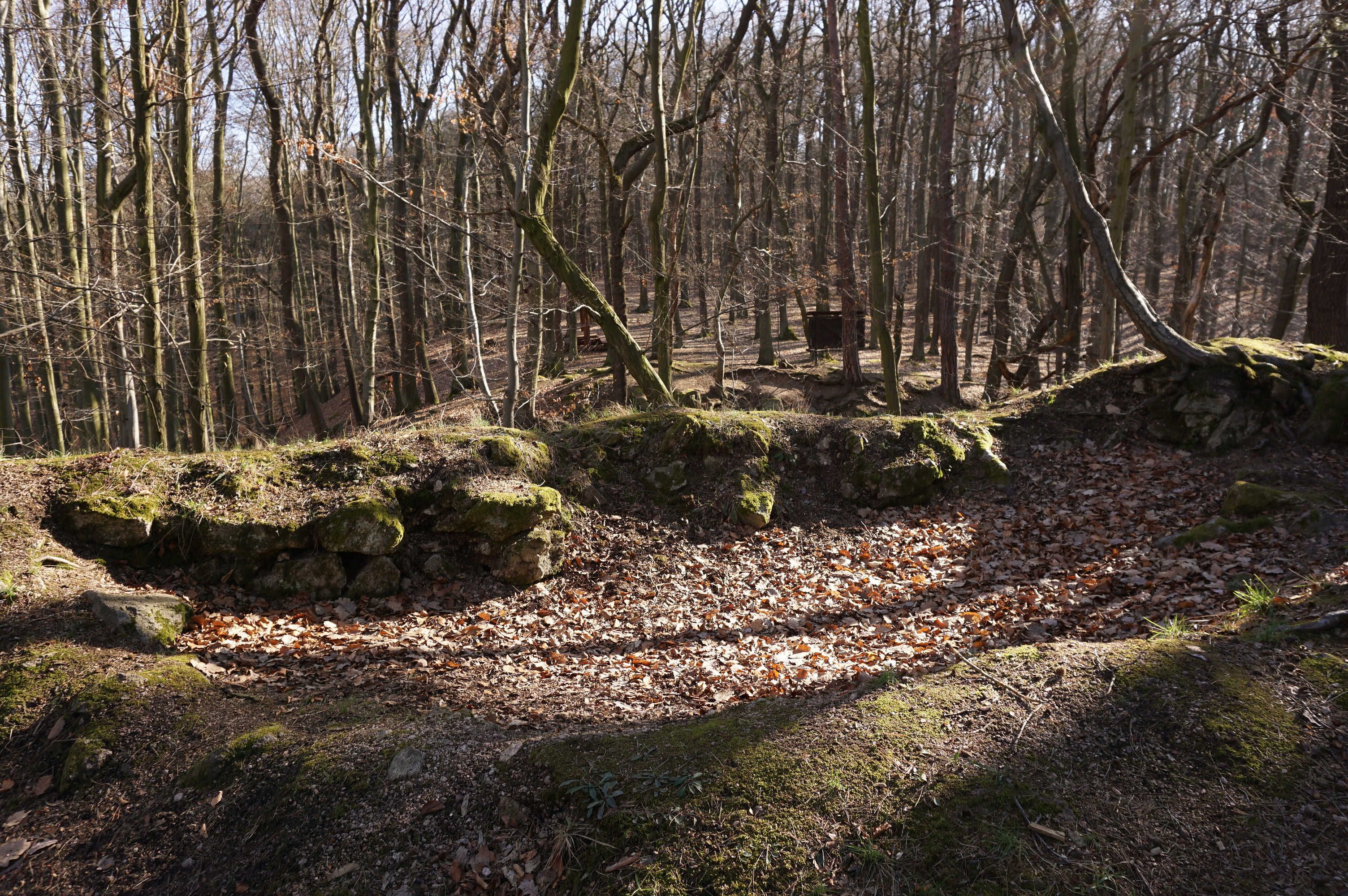 Hradiště Na starých zámkách a hrad Šember, k. ú. Doubravčice, Kozojedy, Kozojedy (okres Praha-východ).